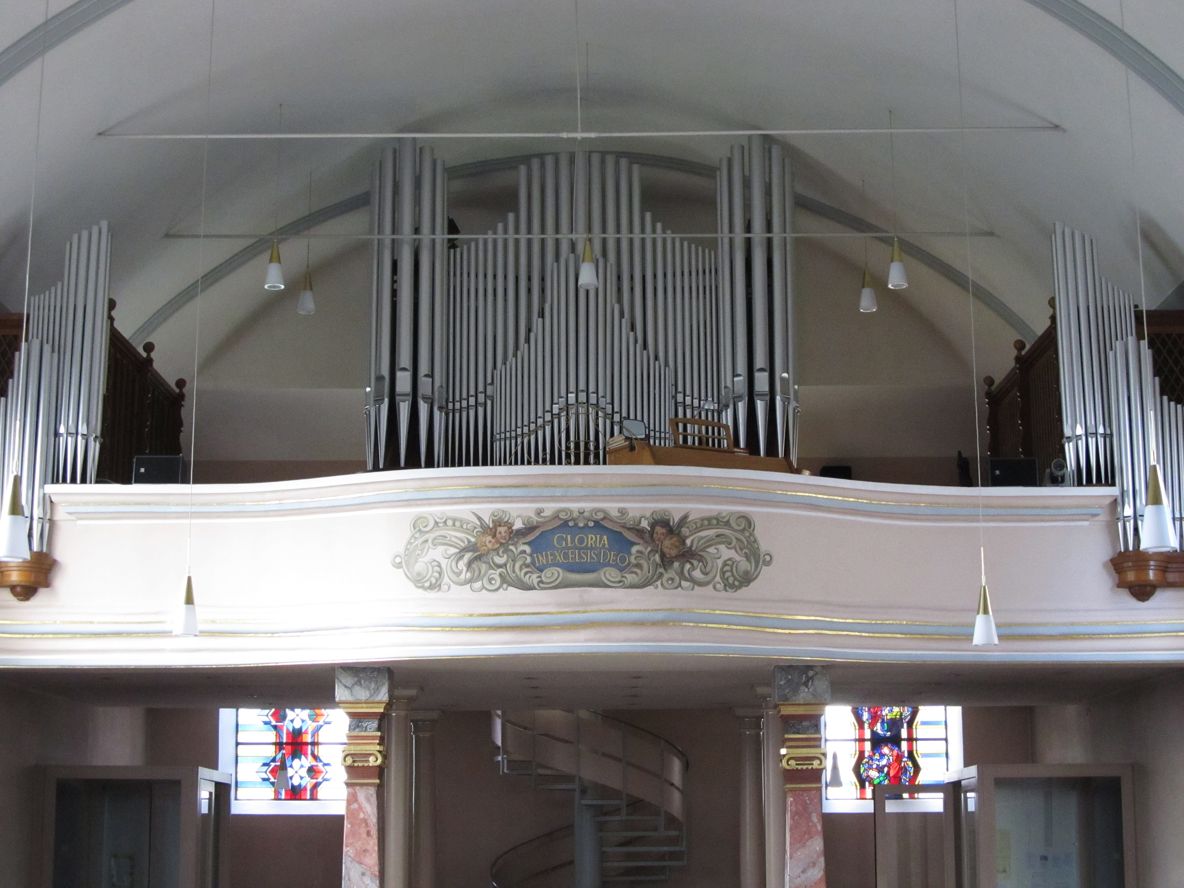 Die Orgel der St. Peterskirche in Ensheim, Saarland